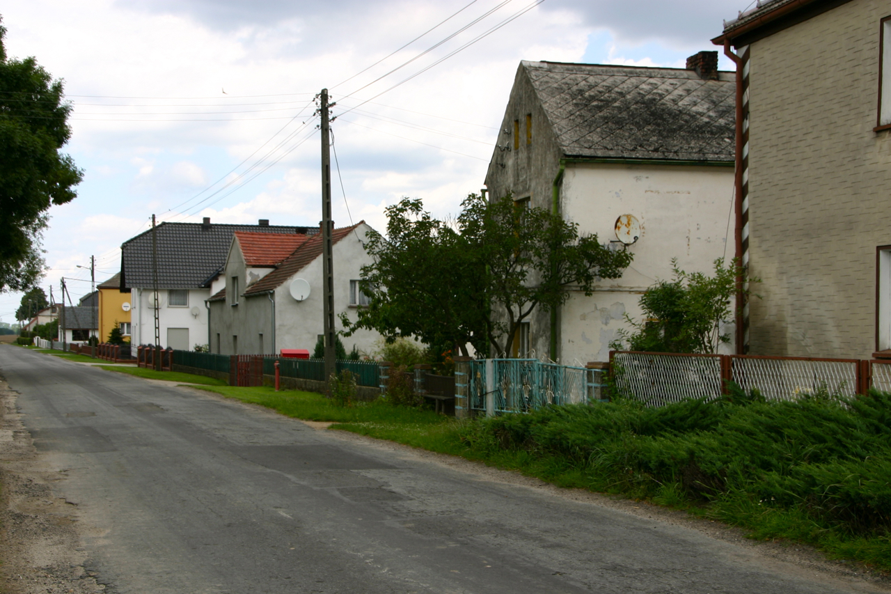 Górka Prudnicka (dodatkowa nazwa w j. niem. Ernestinenberg) – wieś w Polsce położona w województwie opolskim, w powiecie prudnickim, w gminie Biała.